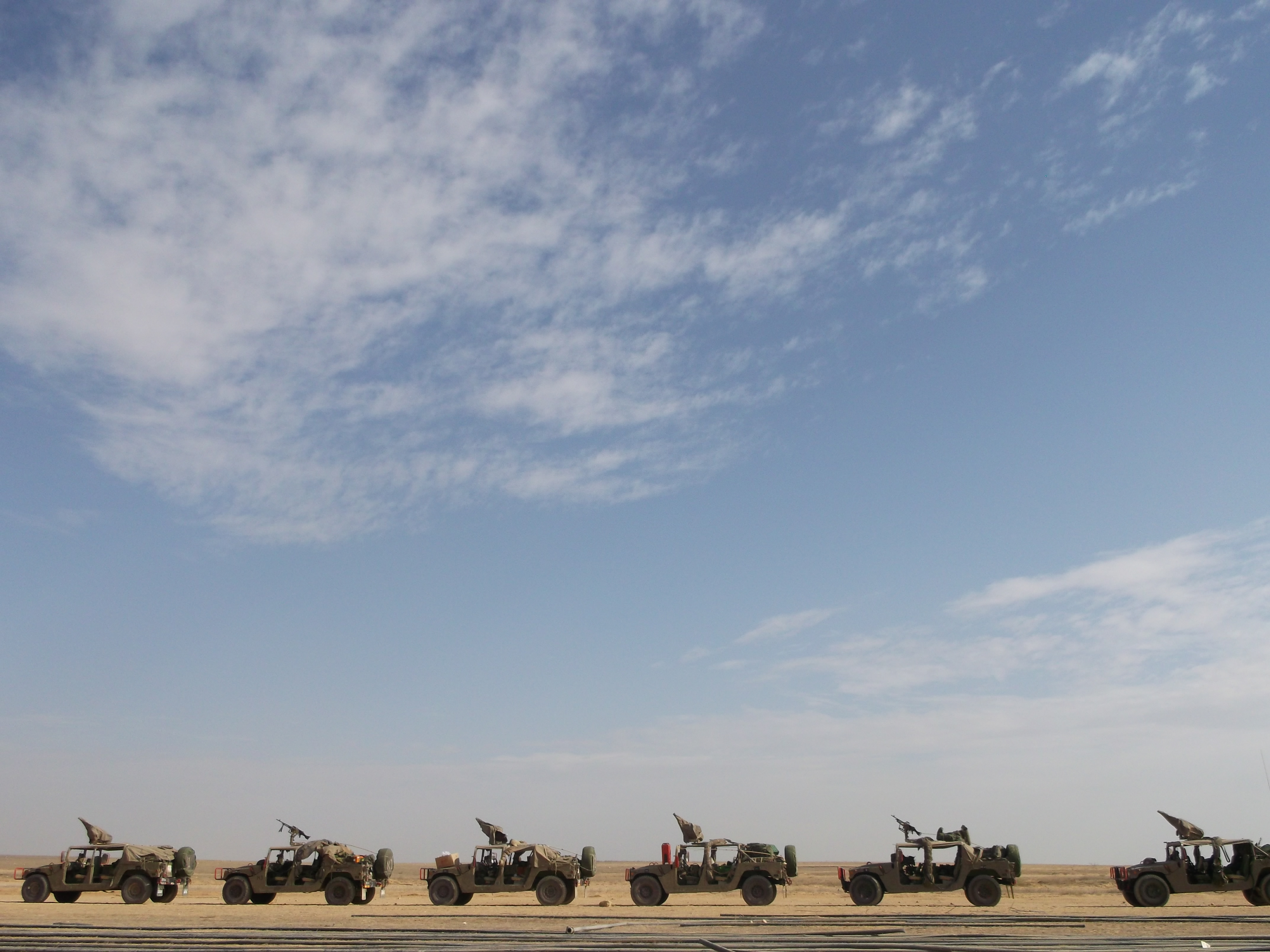 פלס"ר 401 בצוק איתן